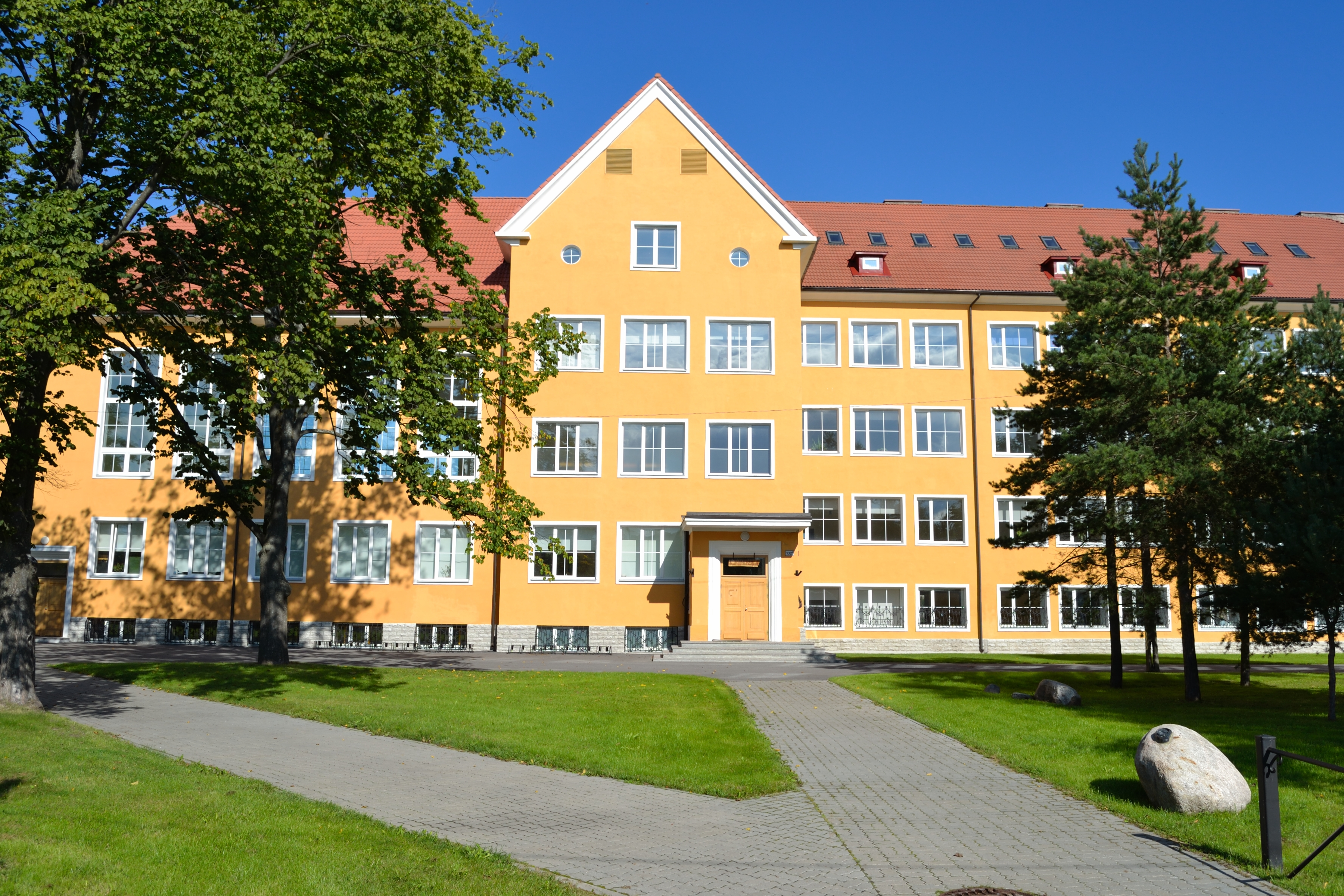 Tallinn, Kopli algkool, 1940, 1949